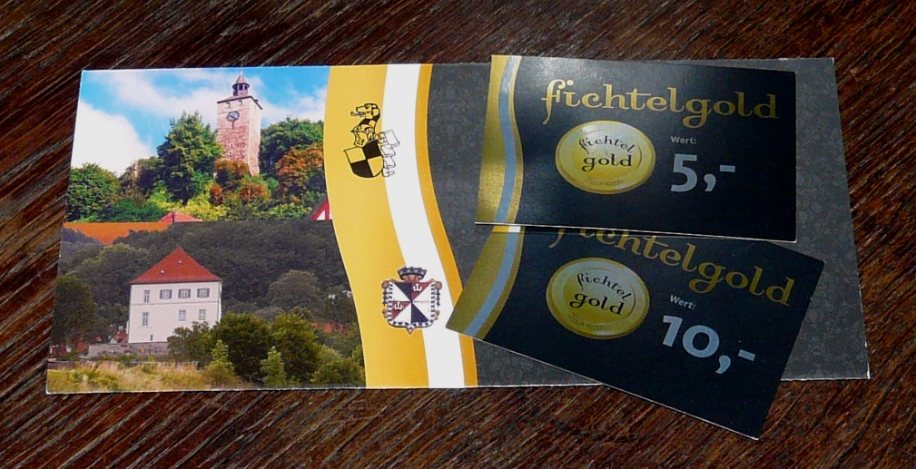 "Fichtelgold" - Regionalgeld Goldkronach und Bad Berneck